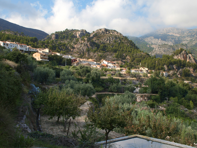 Panorama de Abdet desde camino del Fanalic